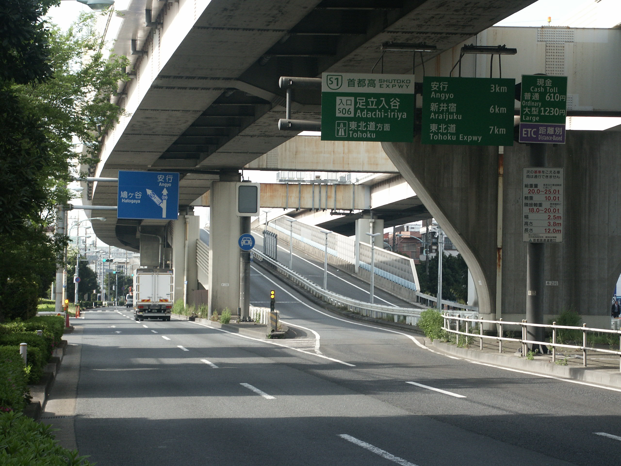 首都高速道路川口線足立入谷入口（一般道との接続部付近）